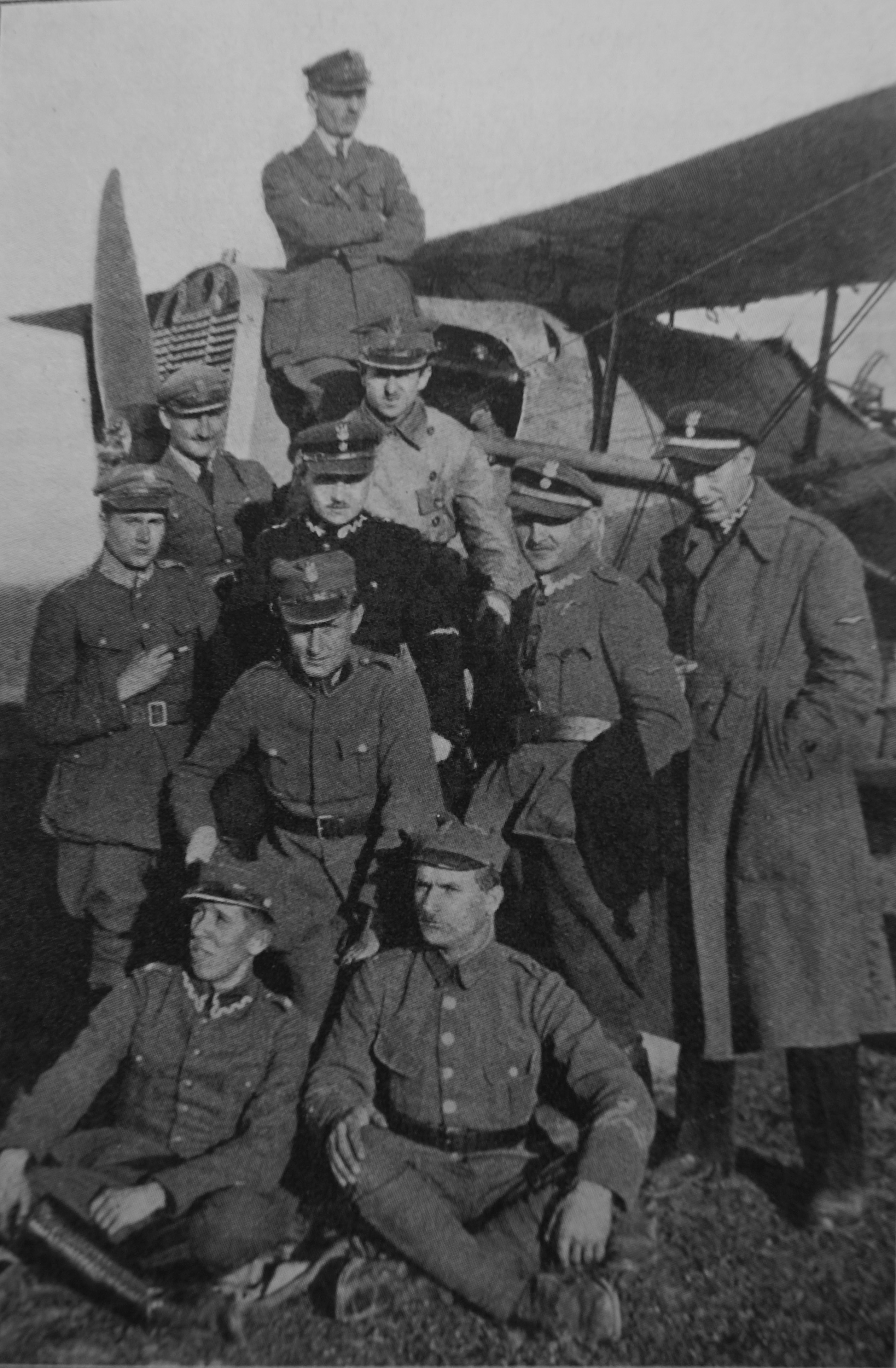 9 eskadra wywiadowcza we wrześniu 1920 w Łucku